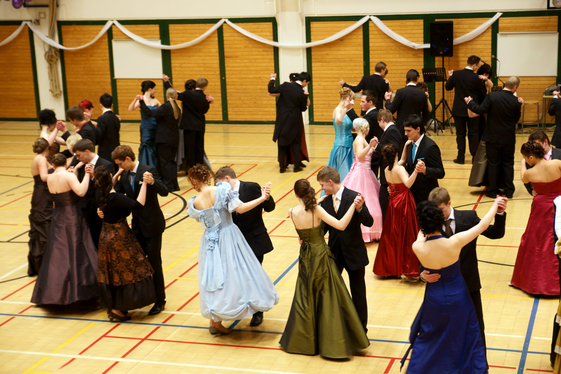 Kehruuvalssi Wanhojen tansseissa Meri-Porin lukiossa.